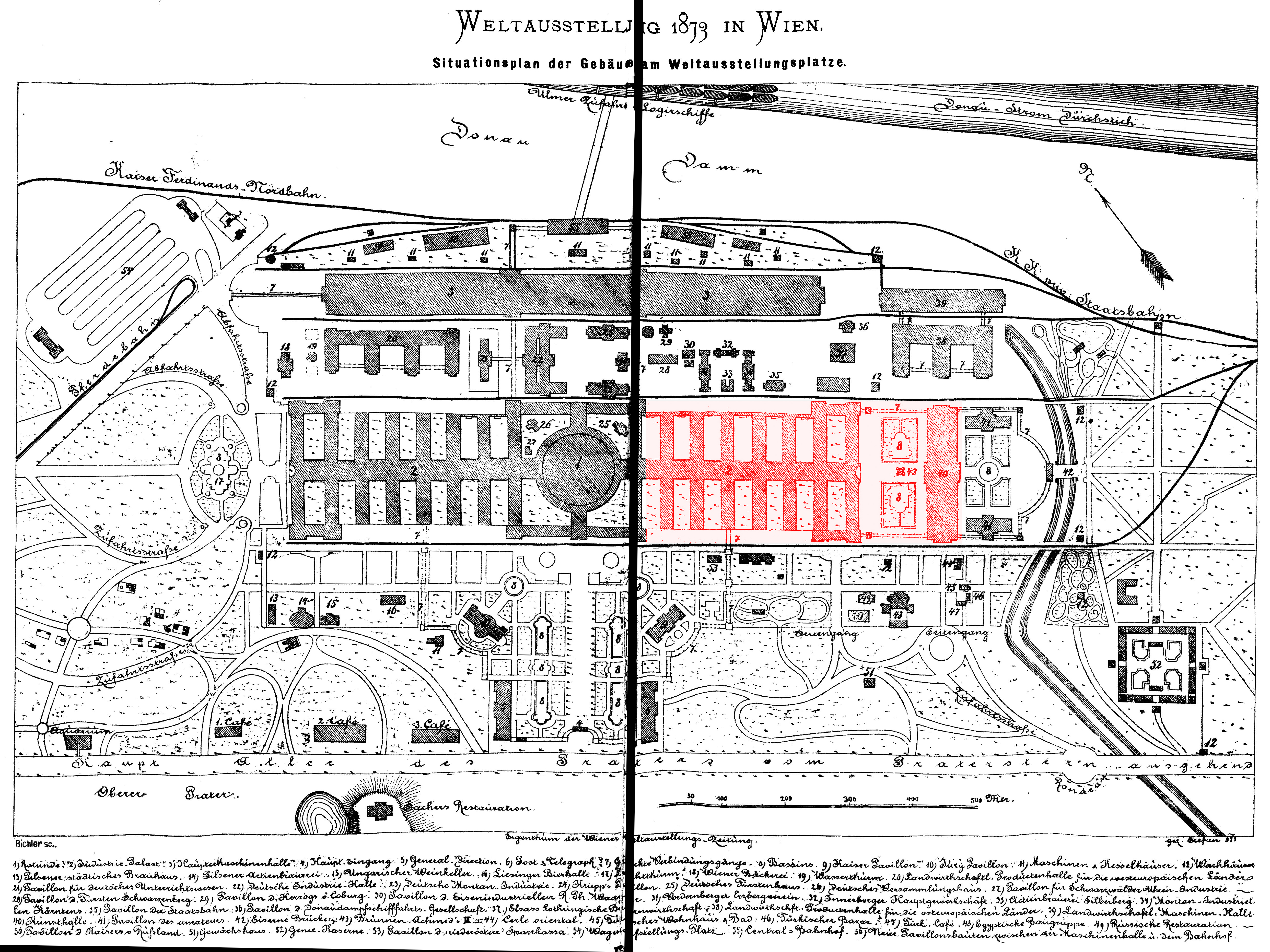 Trabrennplatz-Krieau-Gelände im Lageplan Rotunde-Industriepalast, Wien